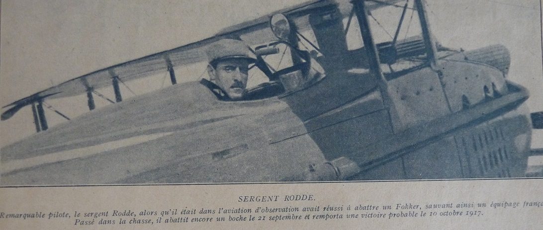 Photographie tirée du magazine La Guerre aérienne illustrée du 2 janvier 1919 - Nos disparus - Le sergent Paul Rodde